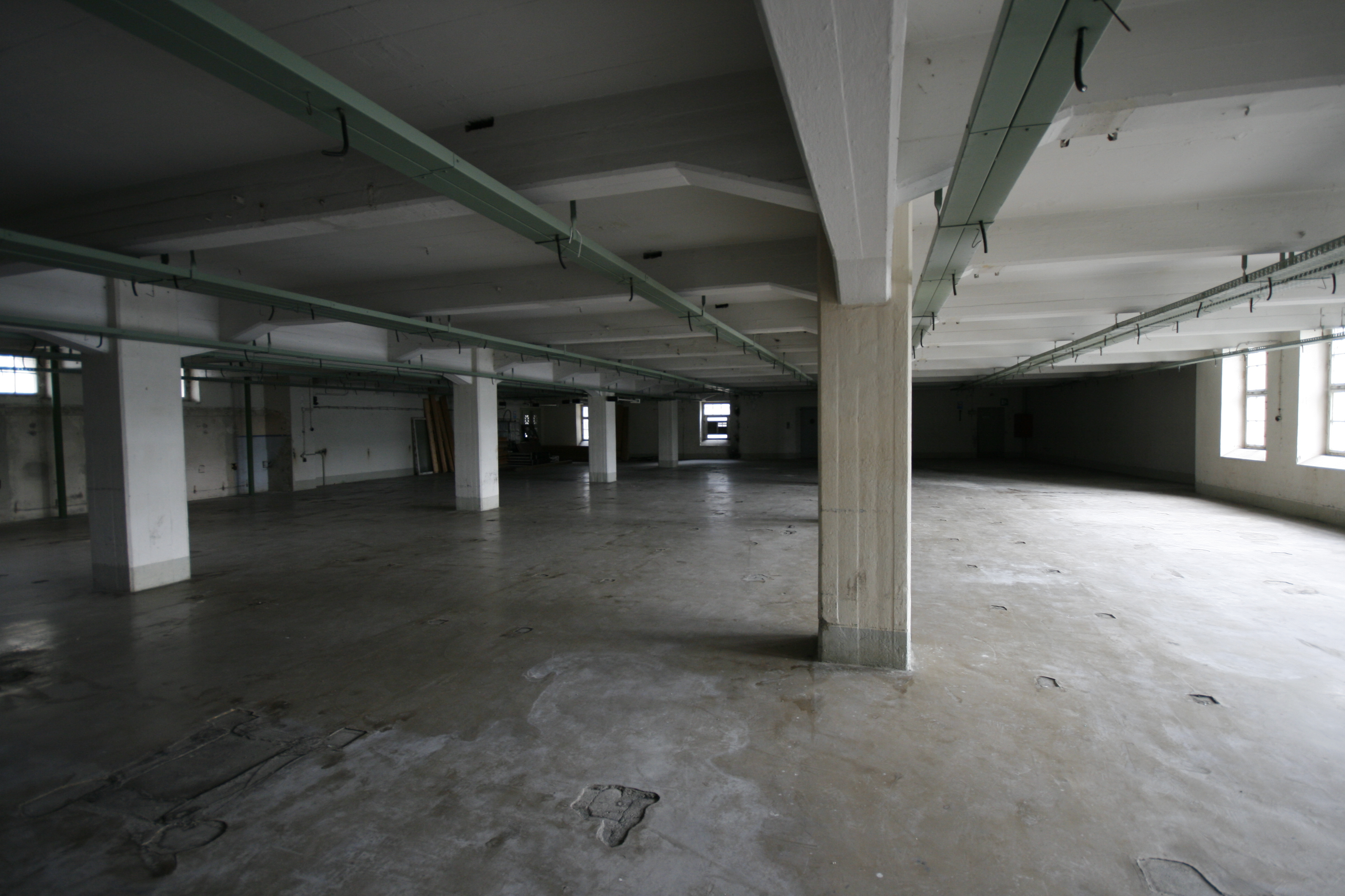 In der Fabrik waren die Häftlinge untergebracht. Sie steht derzeit leer.